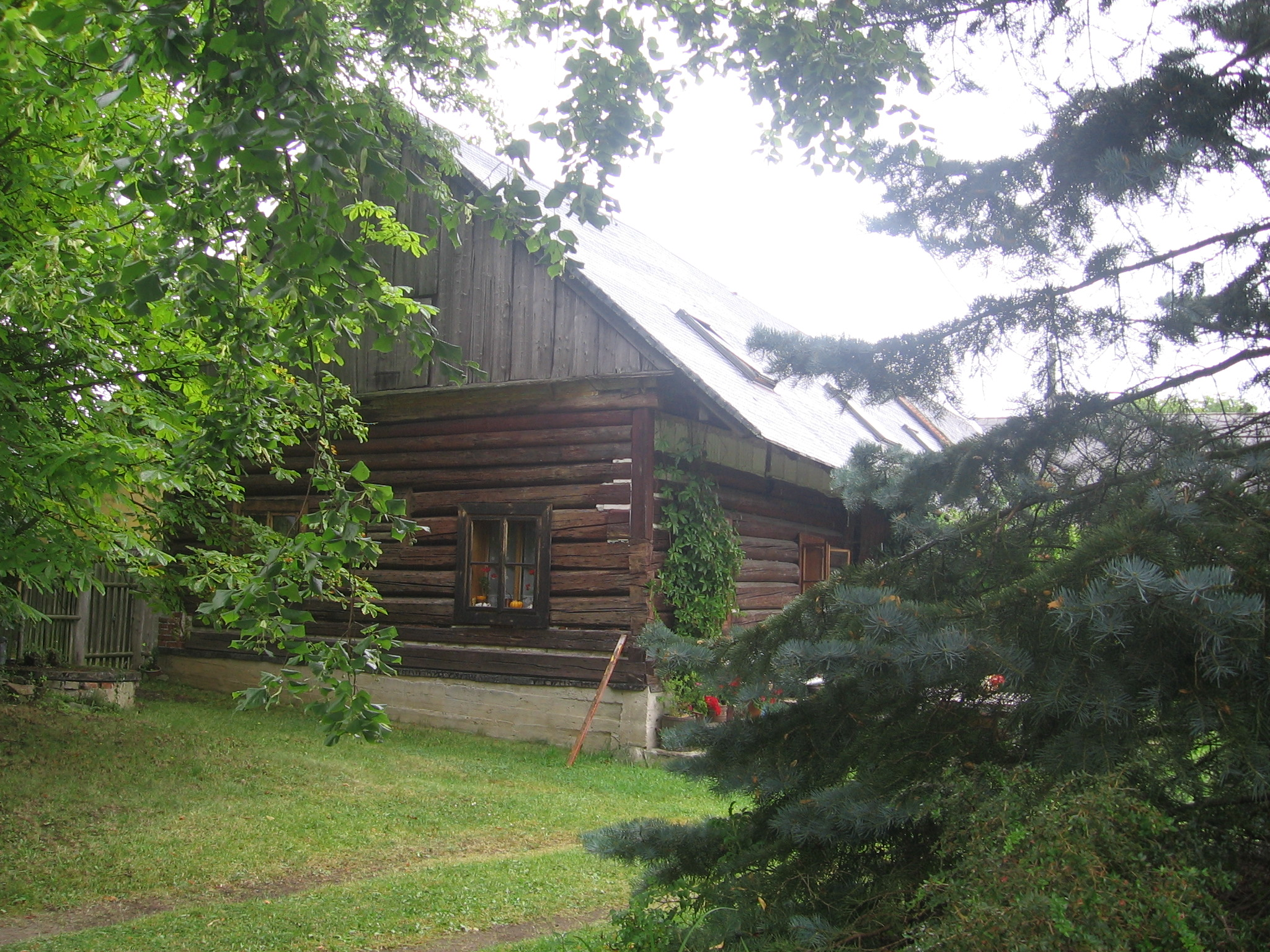 Venkovská usedlost, Lučice čp.2, okr.Klatovy